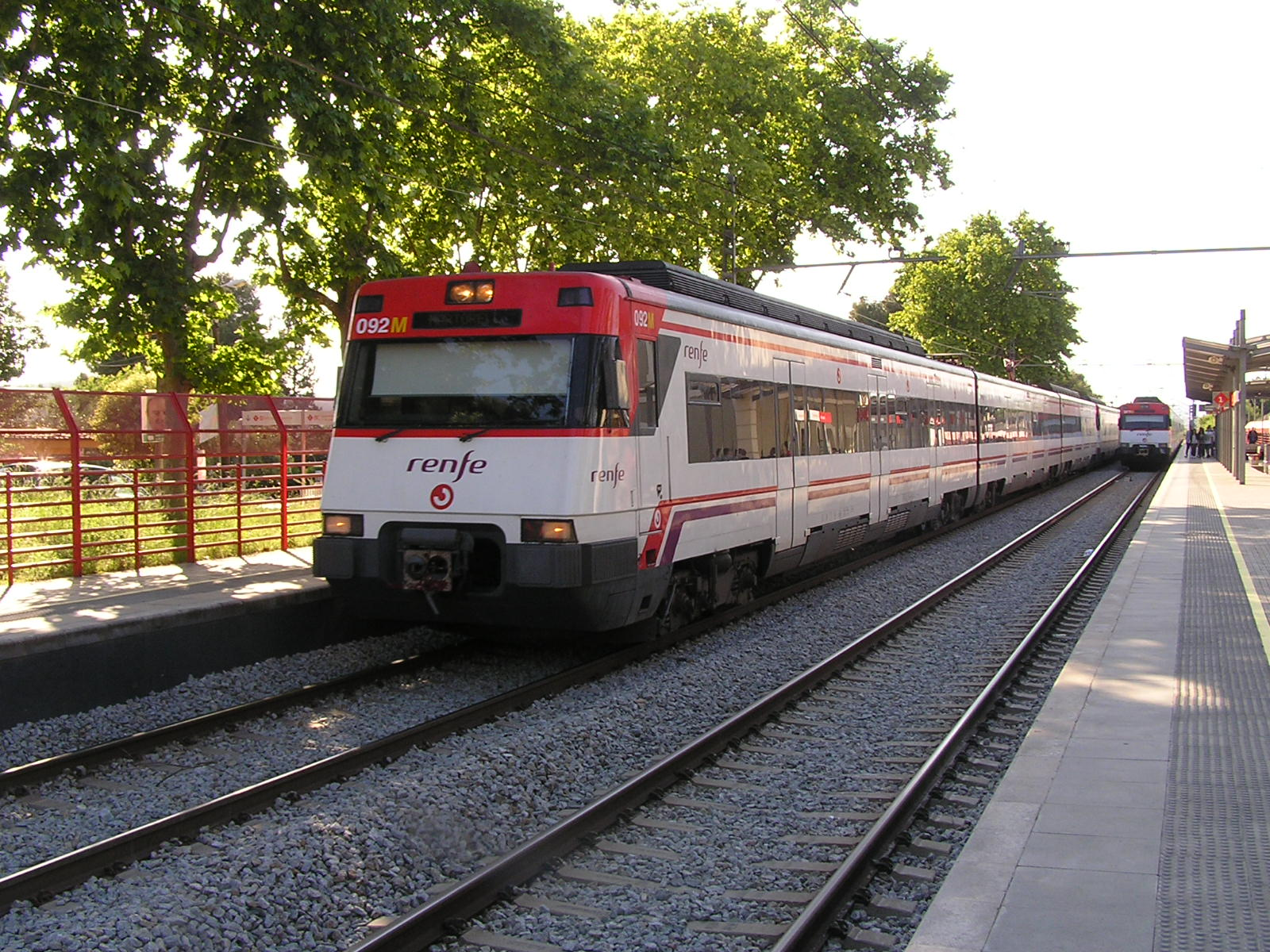 Dos automotores de la serie 447, que realizan servicios R4 de Rodalies de Catalunya, se cruzan en la estación de Barberà del Vallès.